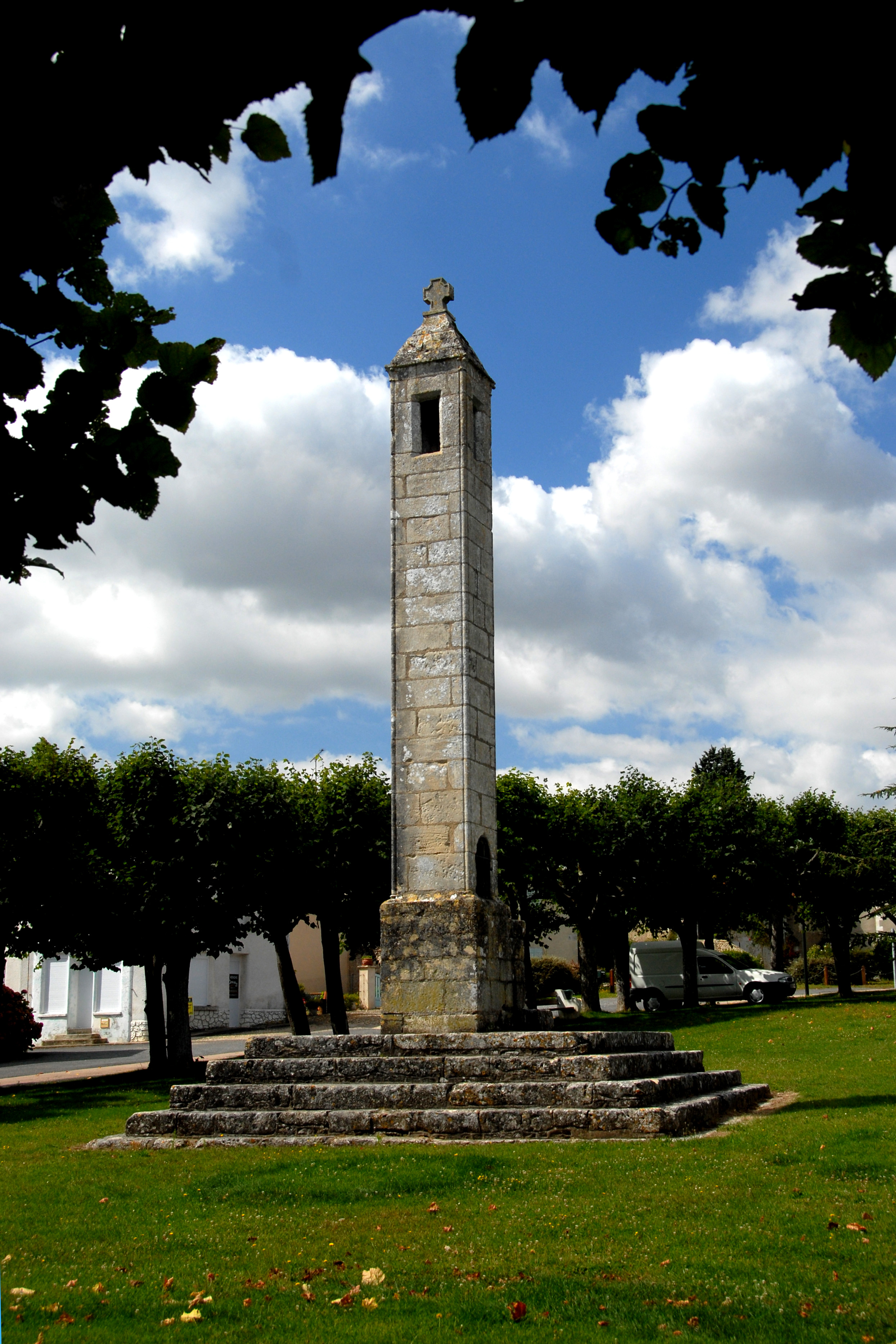 Antigny, Totenlaterne